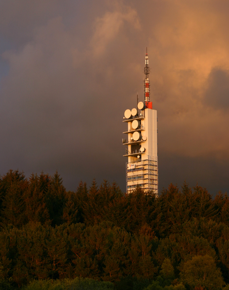 Ullandhaaugstaarnet